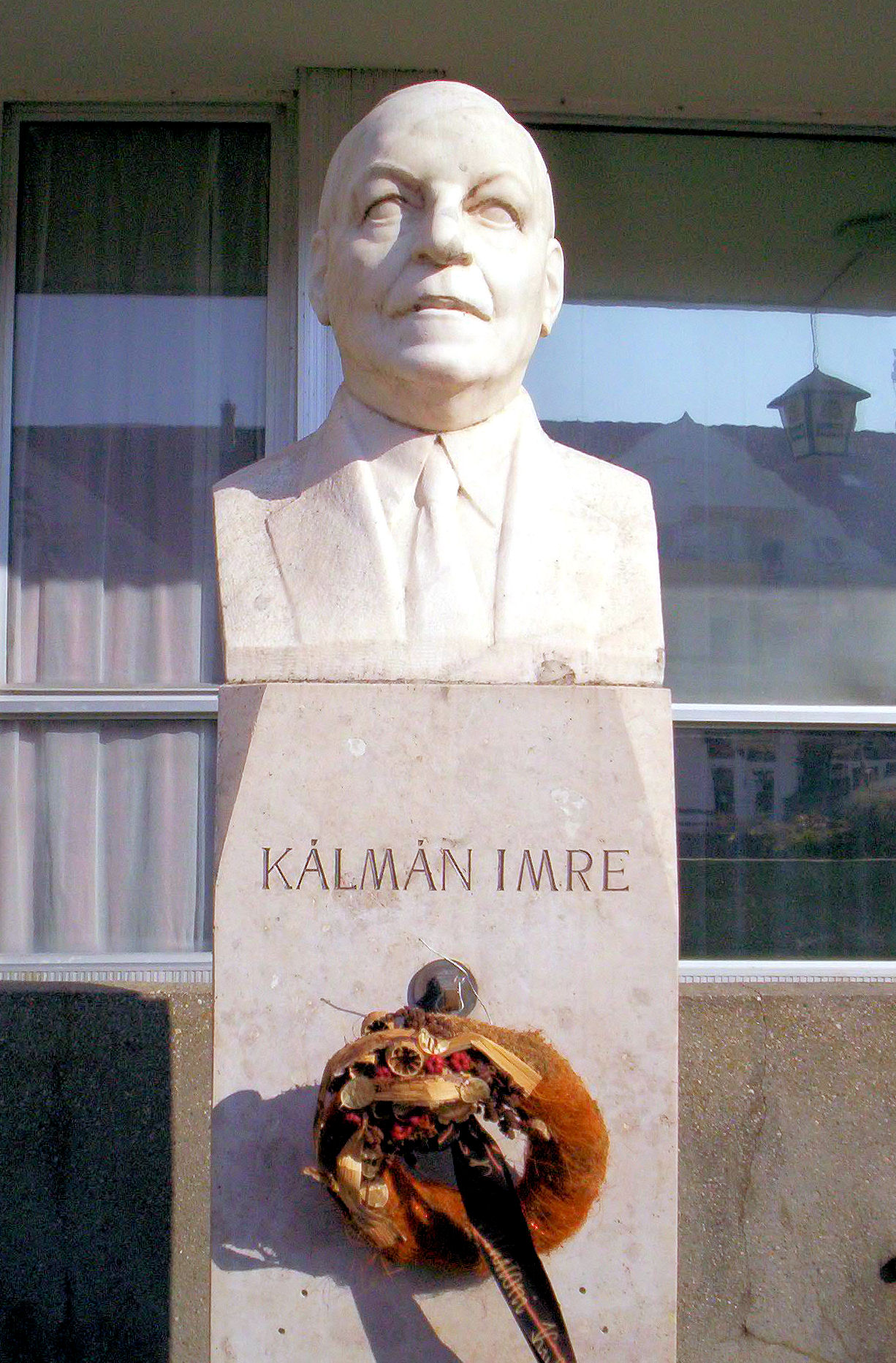 Kálmán Imre szobra Siófokon (Meszes Tóth Gyula alkotása) – photo taken by the uploader 2005